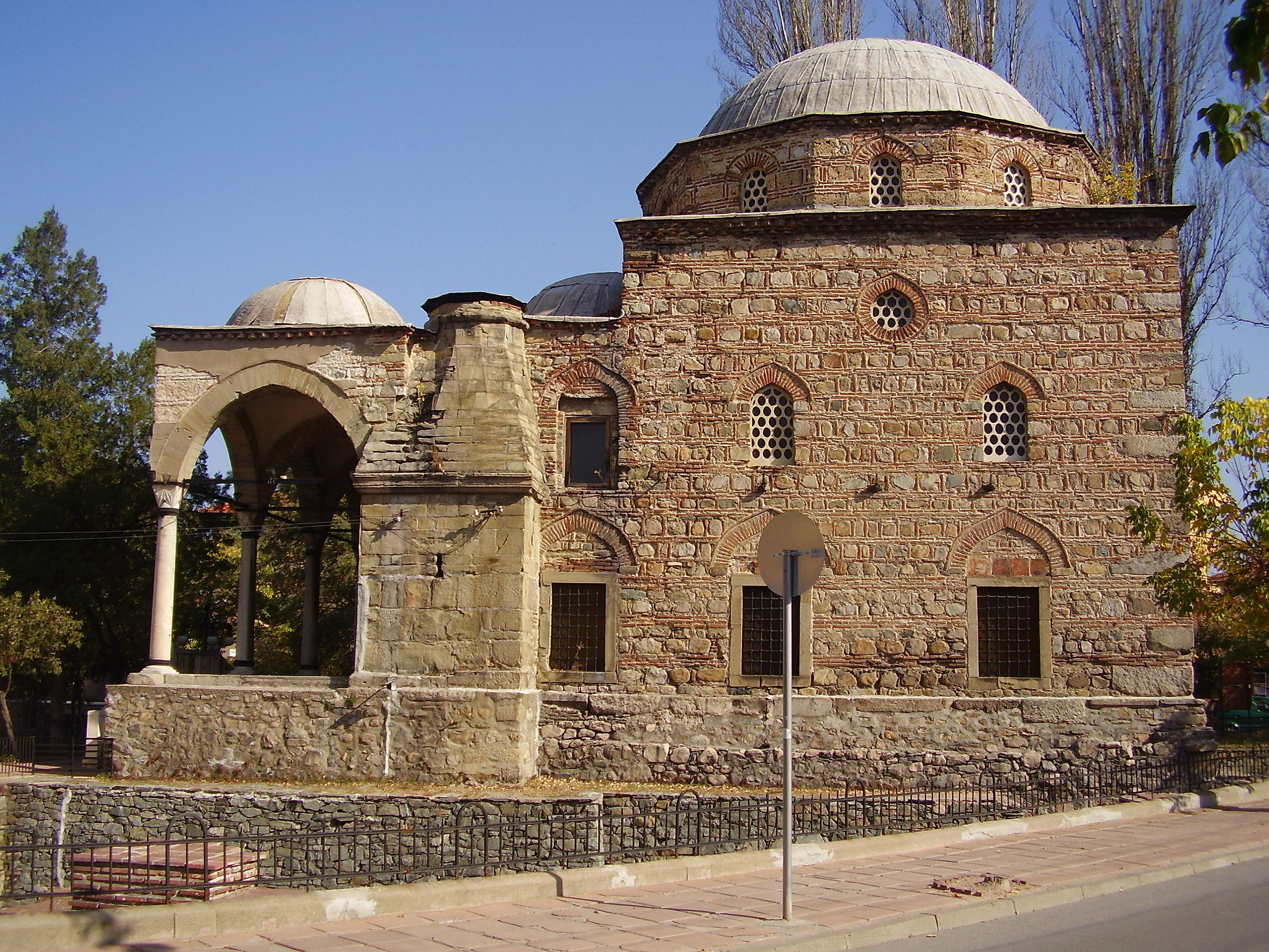 Джамия "Ахмед Бей" - гр.Кюстендил